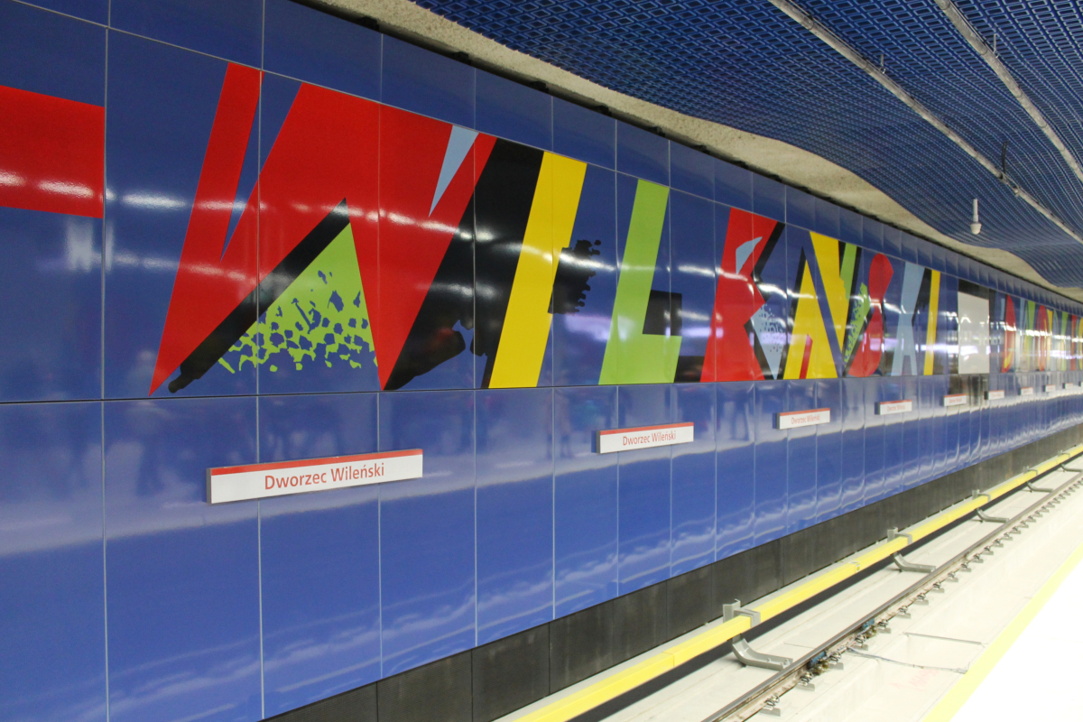 Ściana zatorowa na stacji C15 Dworzec Wileński. - Opracowanie graficzne Wojciech Fangor